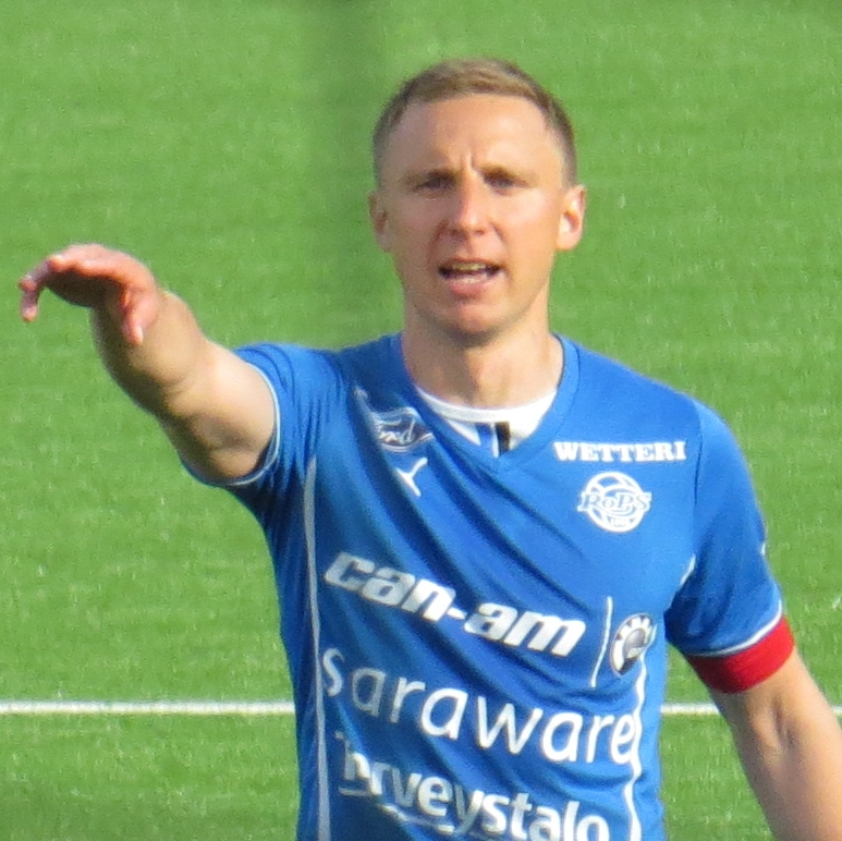 Antti Okkonen, suomalainen jalkapalloilija Rovaniemen Palloseuran joukkueessa kaudella 2015.